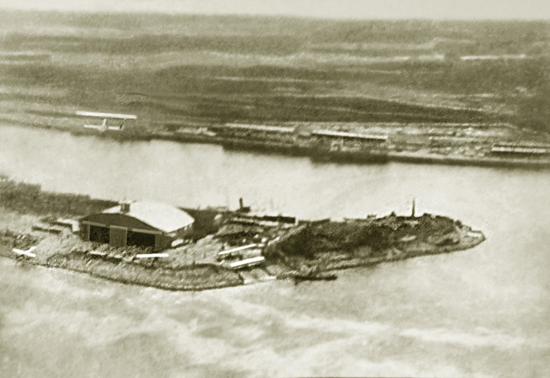 Петроград, Гутуевский остров. Аэродром с ангаром Офицерской школы морской авиации. Аэрофотосъемка